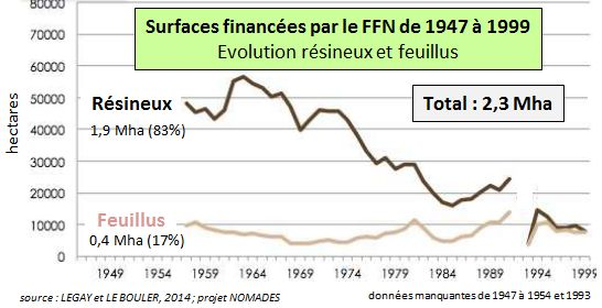 d'après LEGAY et LE BOULER, 2014 ; Eléments d'histoire et de répartition géographique des essences forestières introduites en France métropolitaine ; projet NOMADES ; fascicule 1